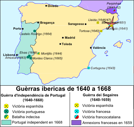 Guèrra Ibericas de 1640 a 1668.